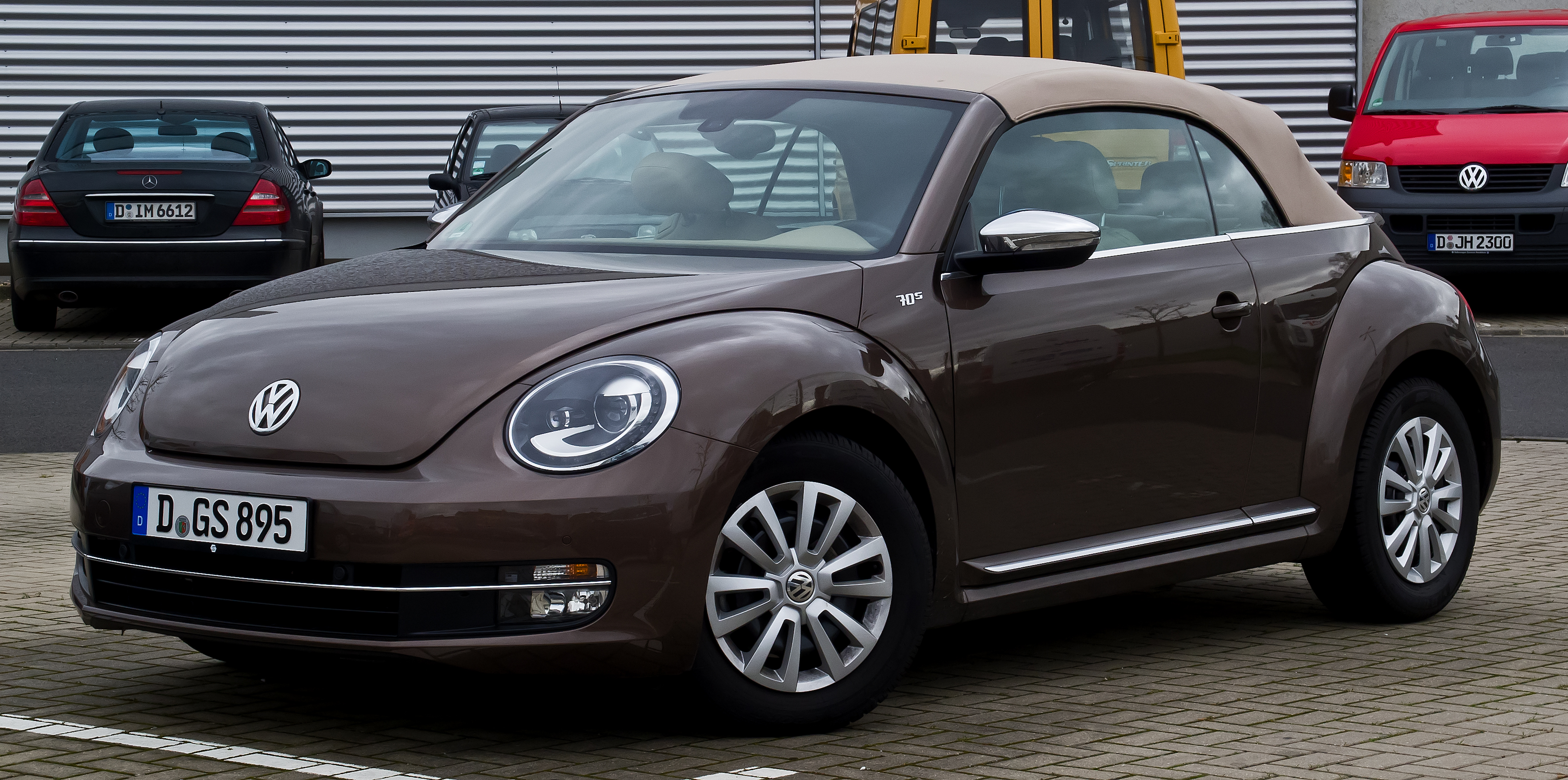 VW Beetle Cabriolet 2.0 TDI 70's Design (II)